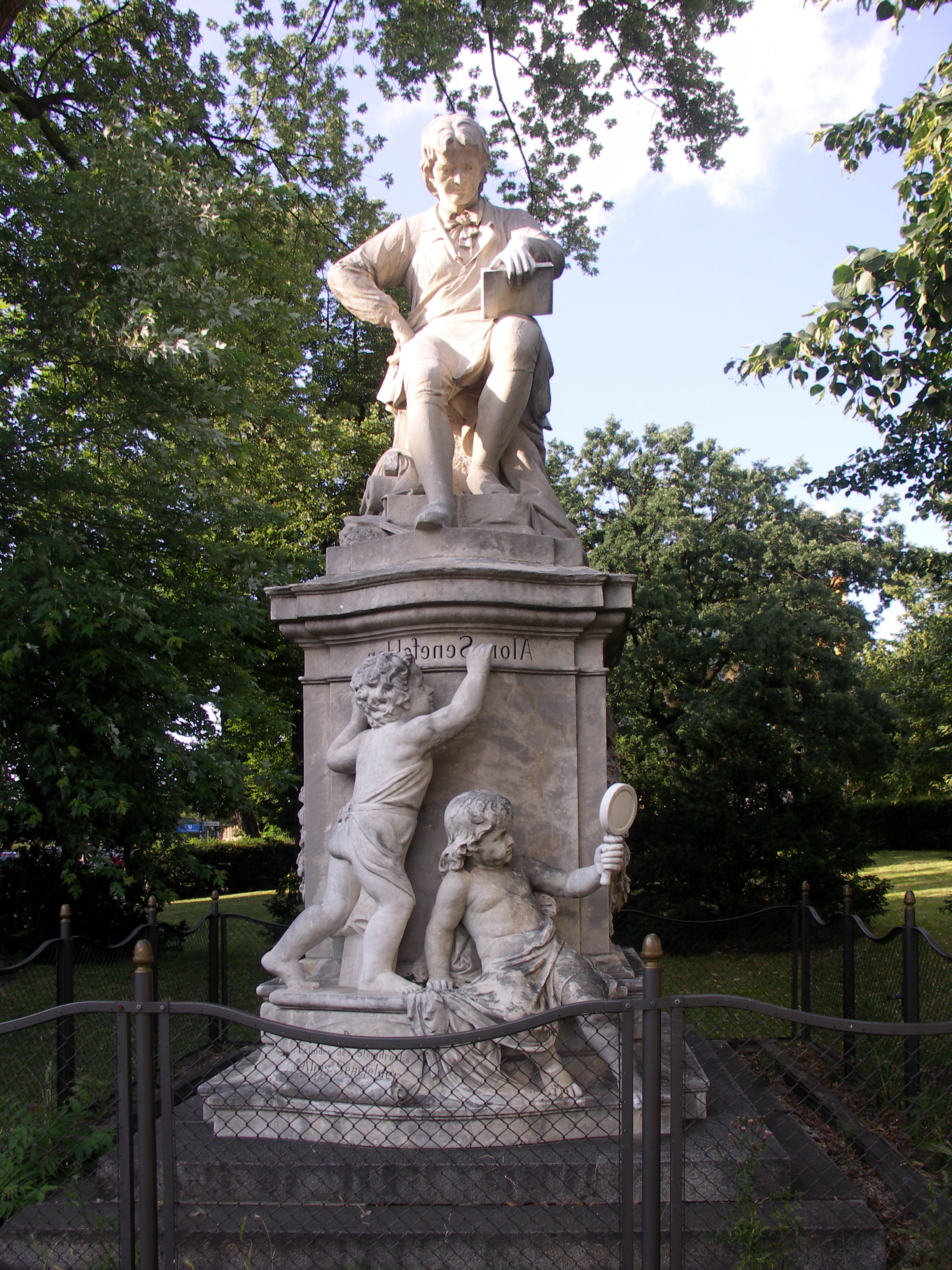 Denkmal Alois Senefelder, Erfinder der Litografie, auf dem Senefelder-Platz in Berlin. Man beachte den von der Putte spiegelverkehrt geschriebenen Namen: wie bei einer Litografie notwendig.